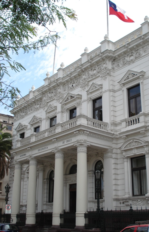 Sede de la Academia Diplomática de Chile, ubicada en la ciudad de Santiago.